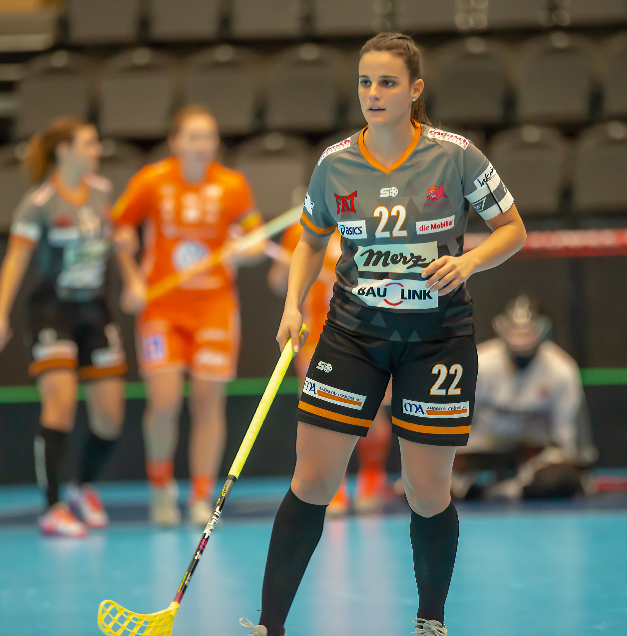 IFF FCC 2019 IKSU-PIRANHA CHUR